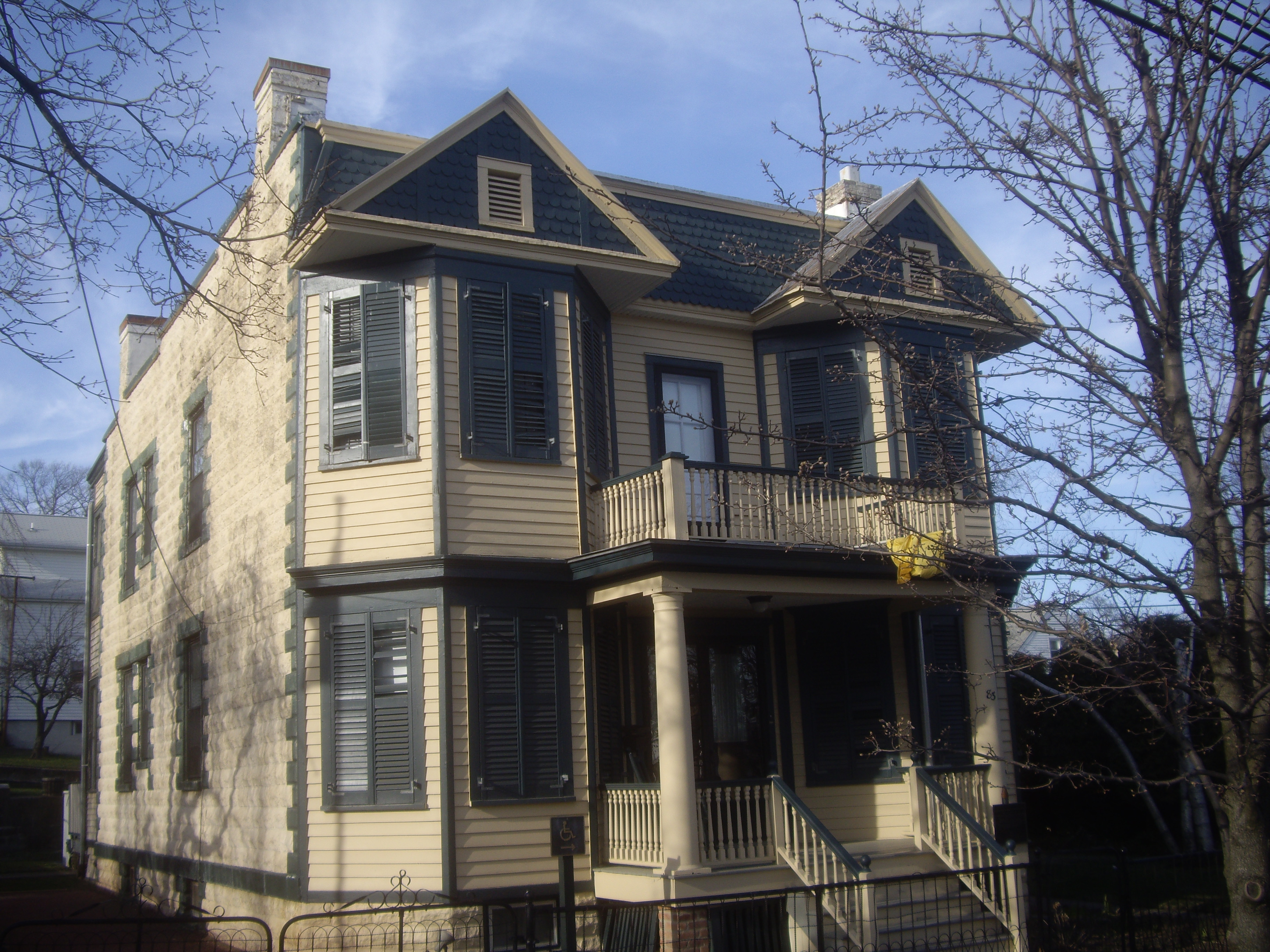 Pietro Botto House